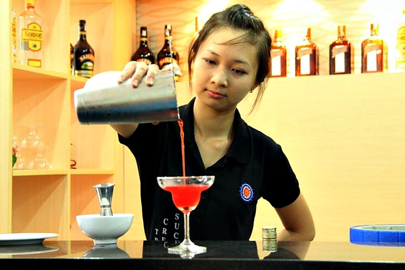 Club Bartender của trường ĐH Hutech